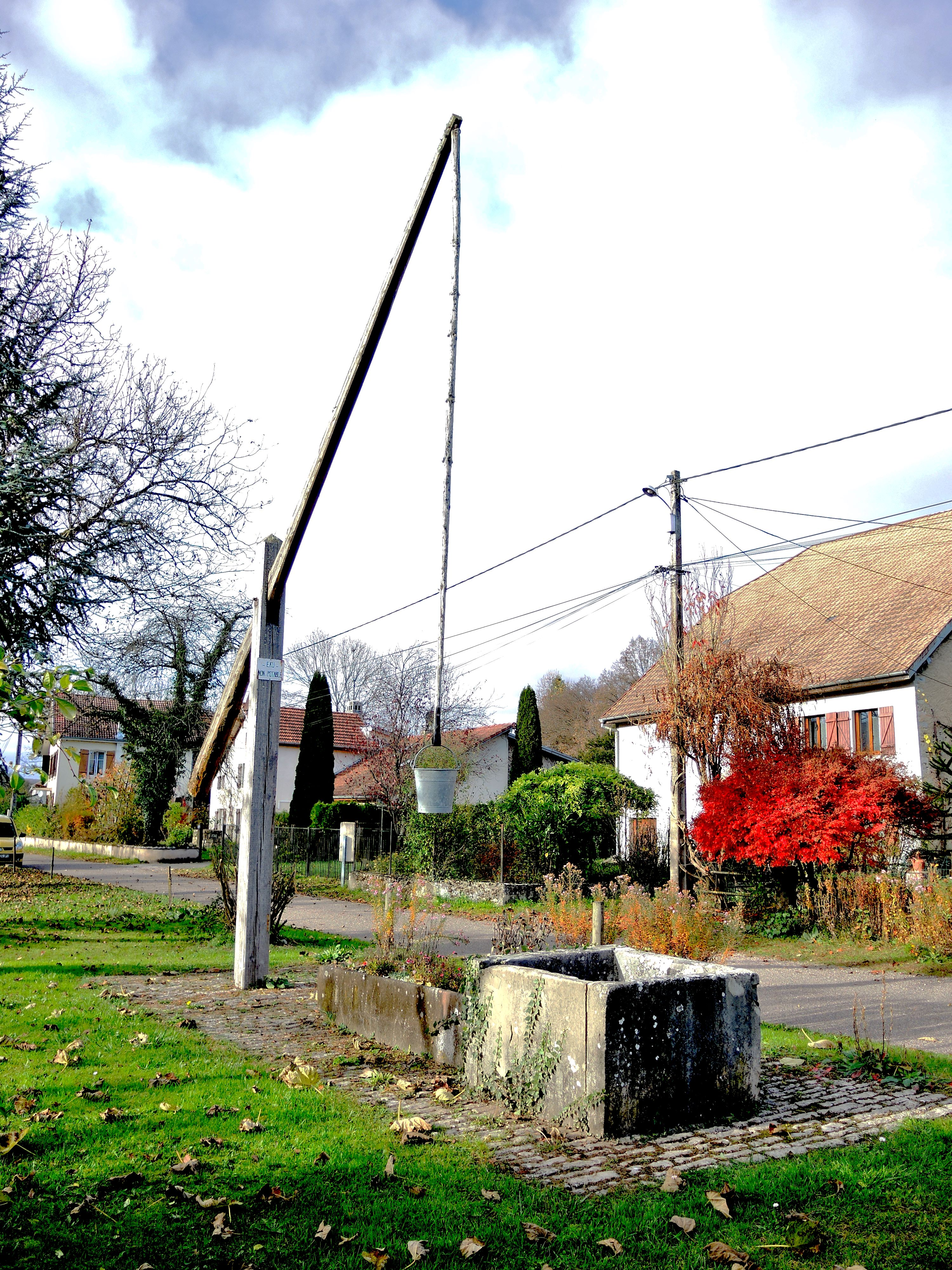 Un des puits à balancier dans le village de Blussangeaux. Département du Doubs. France.